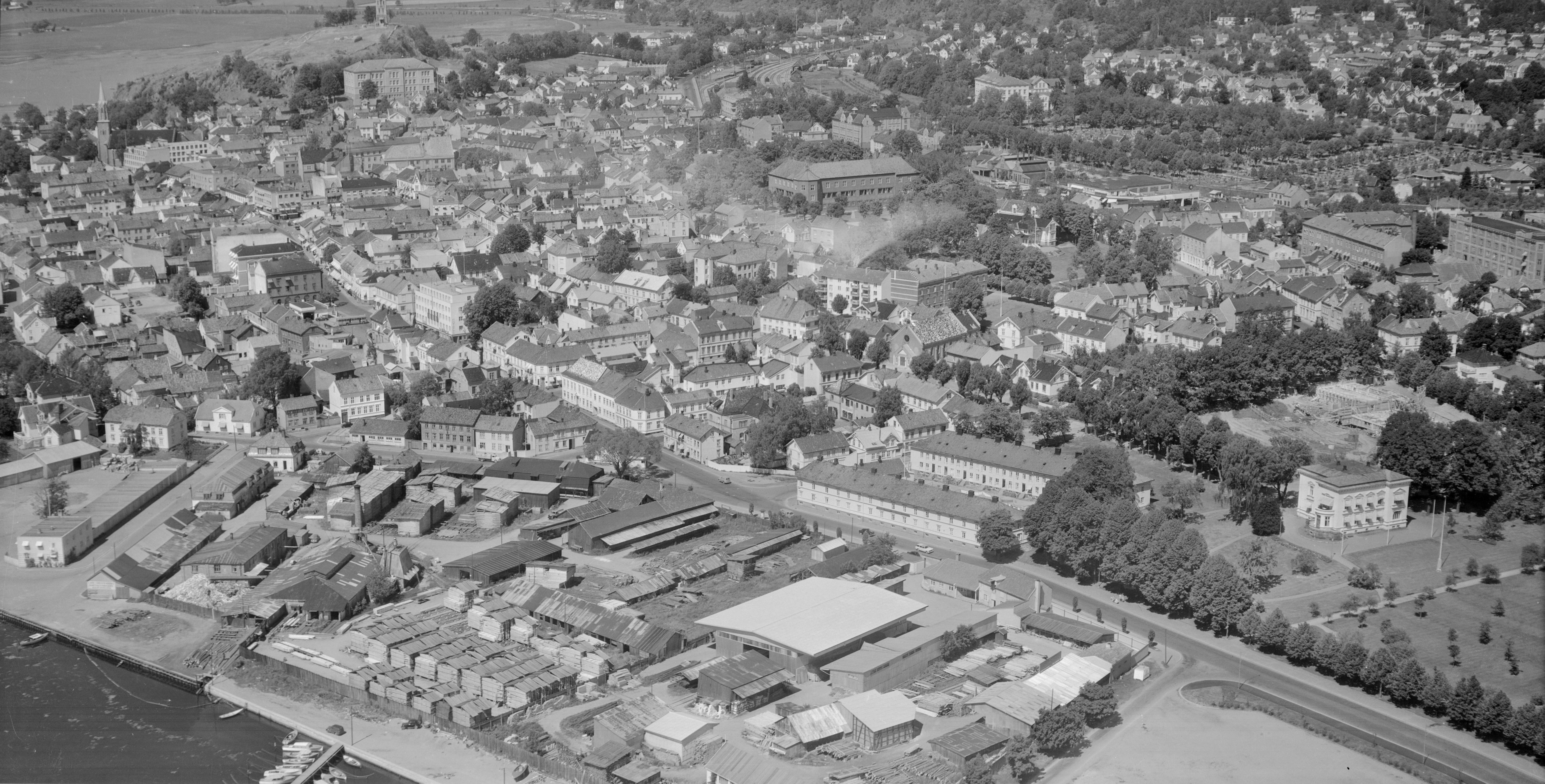 FW.S.11818